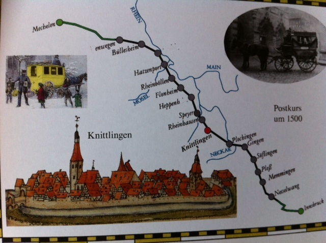 Ruta comercial. Postkurs um 1500 mit den eingezeichneten Flüssen Rhein, Main, Mosel und Neckar und den Stationen Innsbruck, Nesselwang, Memmingen, Pleß, Söflingen, Gingen, Plochingen, Knittlingen, Rheinhausen, Speyer, Heppen..., Flohnheim, Rheinböllen, Hatzenport, Büllesheim, ...enwegen und Mechelen.